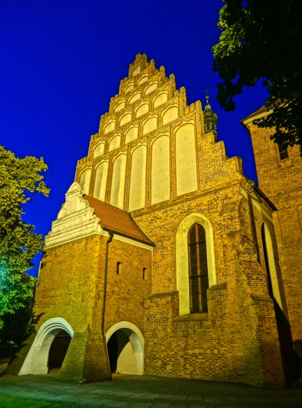 Katedra p.w. św. Marcina i Mikołaja w Bydgoszczy (XIV-XV wiek)